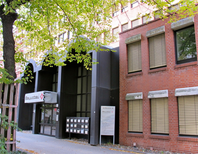 Schultheiss tidigare huvudkontor i Kreuzberg i Berlin